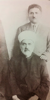 العلامة الشيخ أحمد بن إبراهيم رضا العاملى (1872 - 1953)، من علماء اللغة والأدب، وكان شاعرًا ومن طلائع العاملين للقضايا القومية والوطنية في بلاد الشام